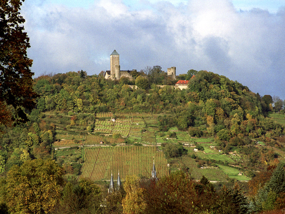 Blick auf den Schloßberg mit der Starkenburg von Süden im Herbst Sonstiges: Scan von Negativ